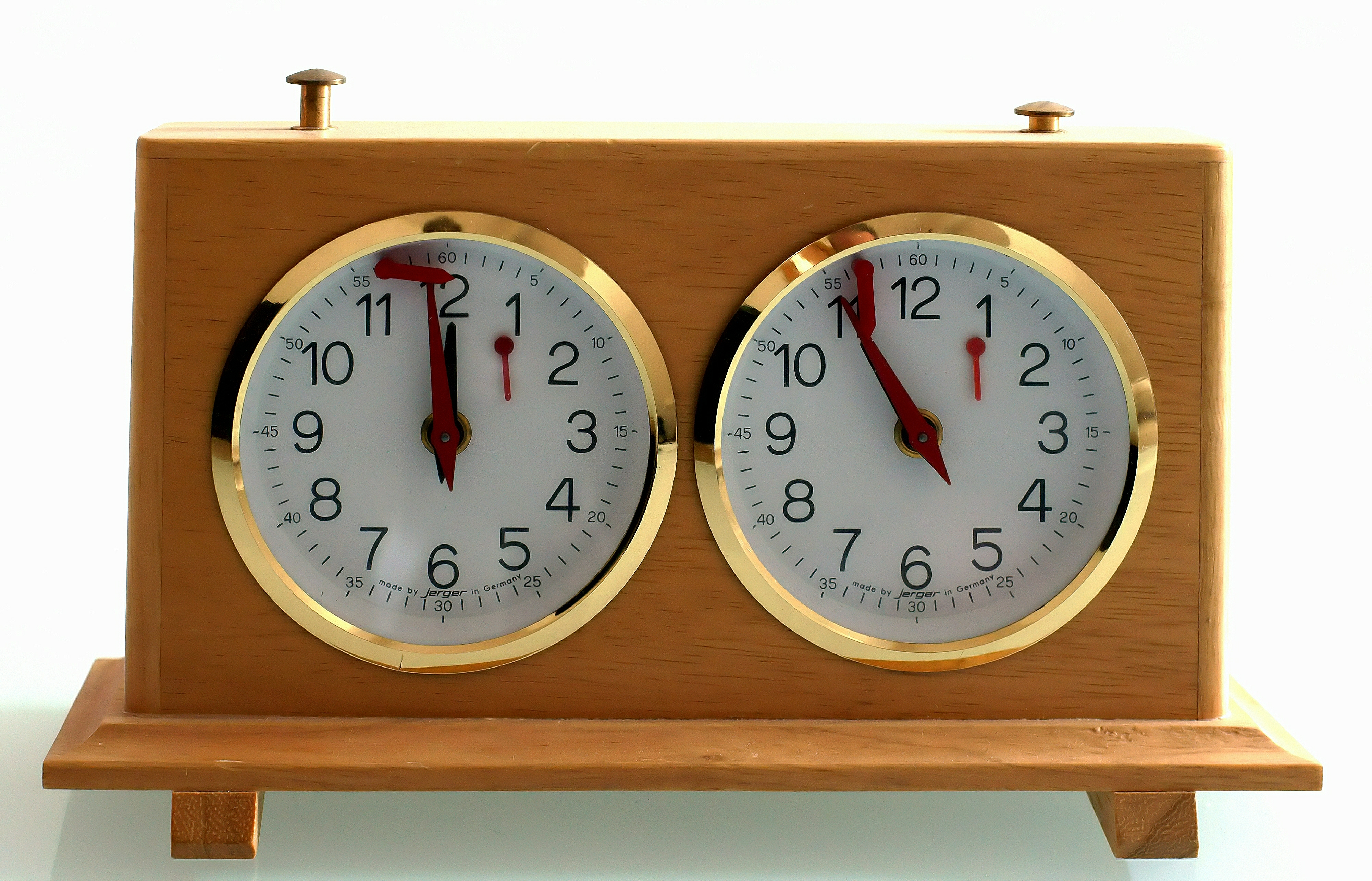 Mit einer Jerger Uhr habe ich 1970 gegen Boris Spasski in Siegen bei der Schacholympiade simultan gespielt (er mit uns) und tapfer verloren. Bent Larsen, Victor Kortschnoi und Lothar Schmid waren auch da, auch Robert James (Bobbie) Fischer, † 17. Januar 2008 in Reykjavík, Island war anwesend photo taken with my sharpest lens: Konica Hexanon 1.8/40mm Pancake (1979)